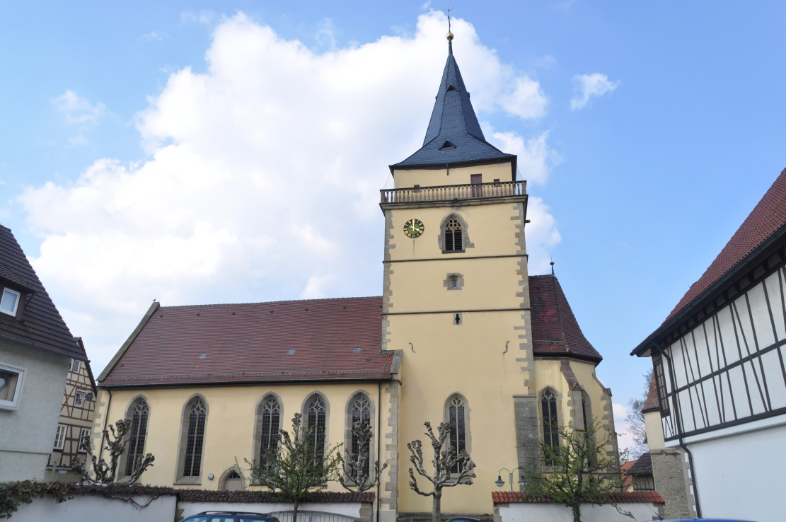 Sachsenheim April 2012